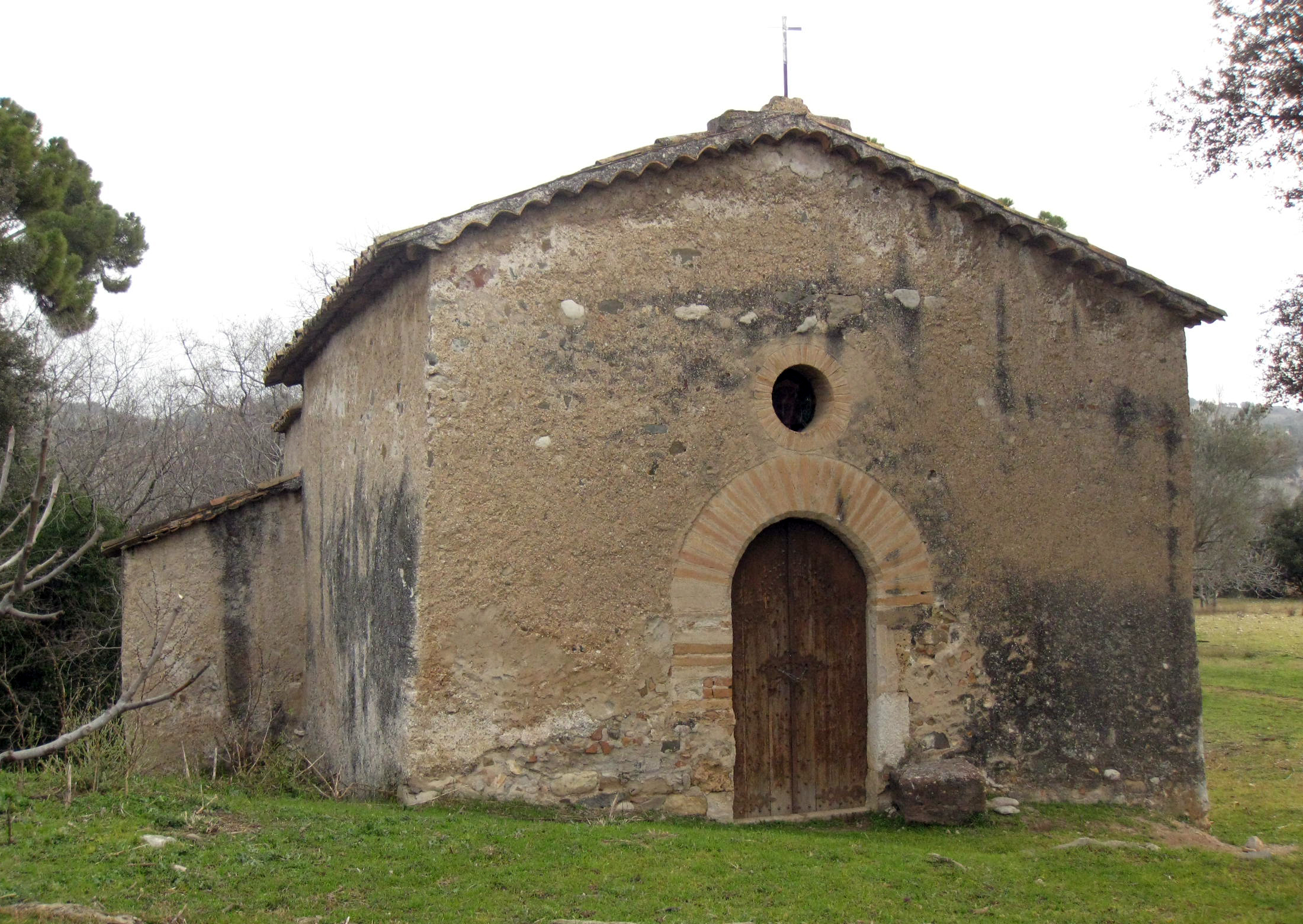 Capella de Sant Hilari (Abrera)